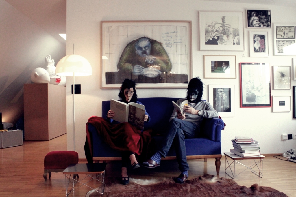 Alejandro Thornton